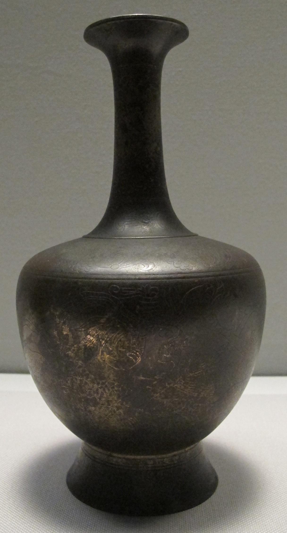 Periodo asuka-nara, brocca, VII-VIII sec